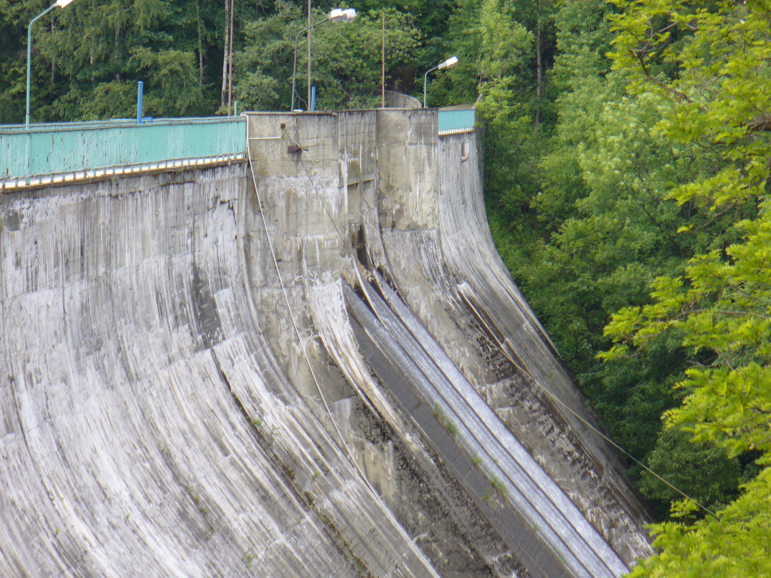 Widok Zapory w Wapienicy z kawiarni "Krzywa Chata".